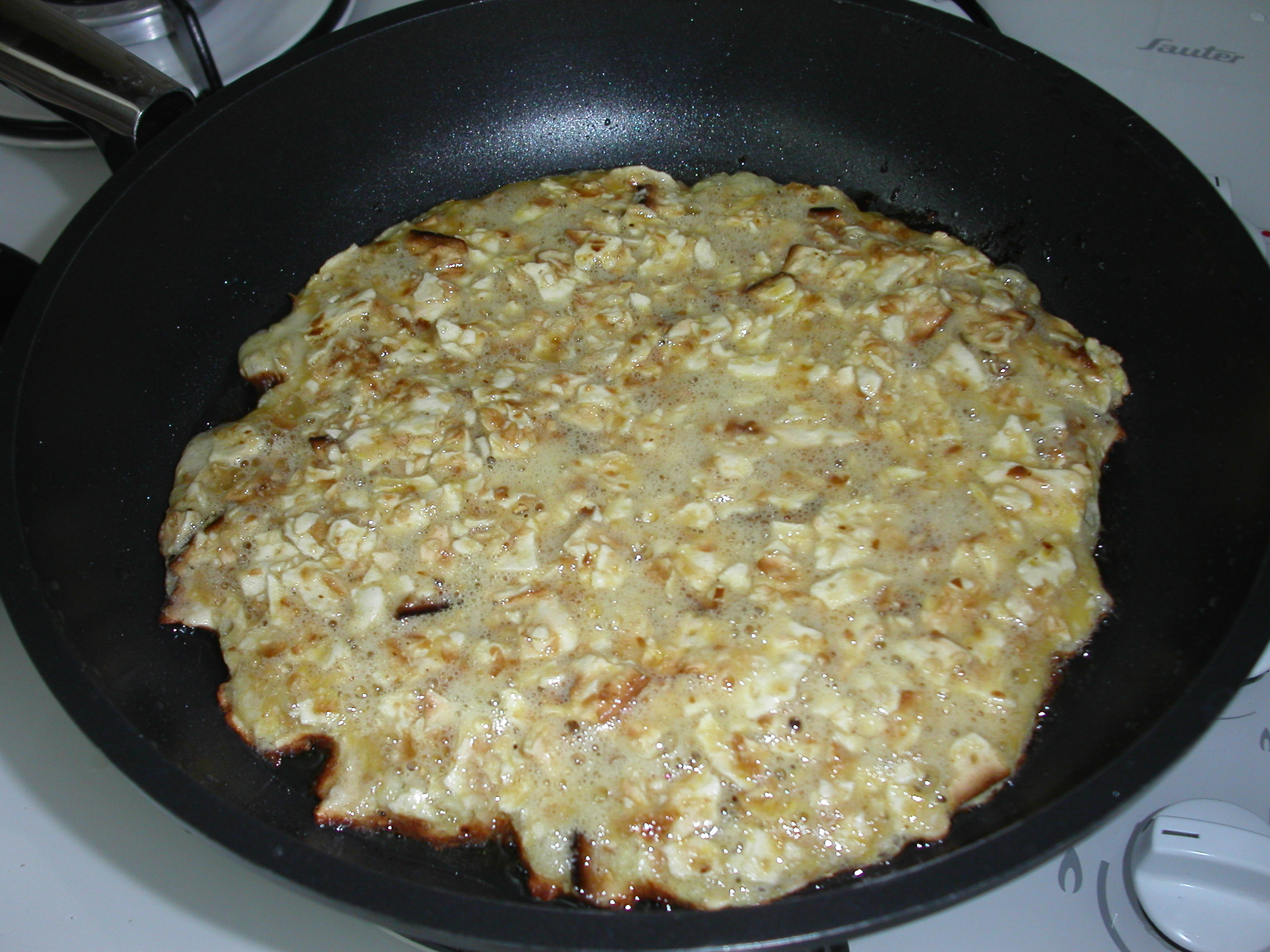 Matzah brei